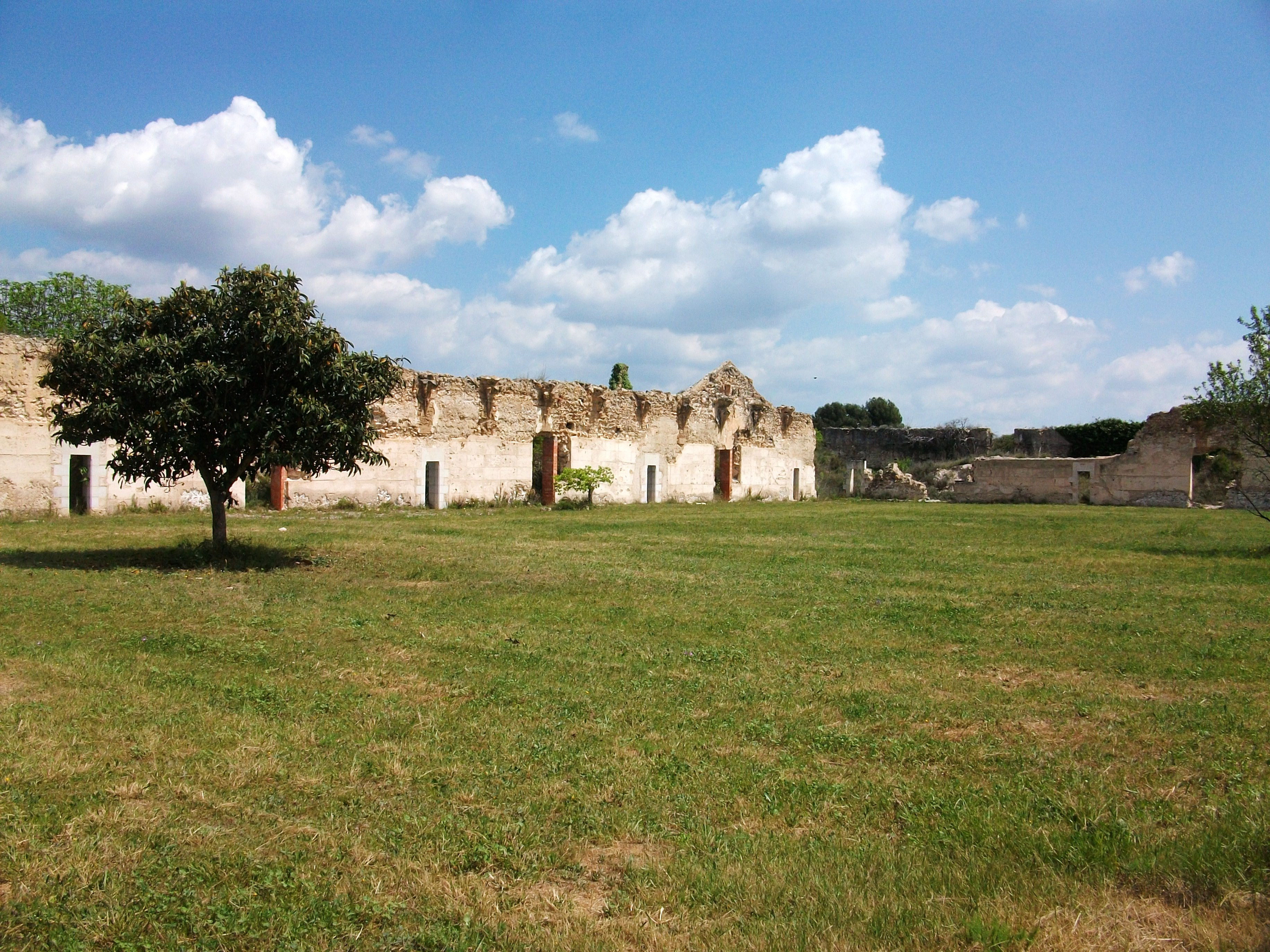 Claustre major de la cartoixa de Valldecrist.